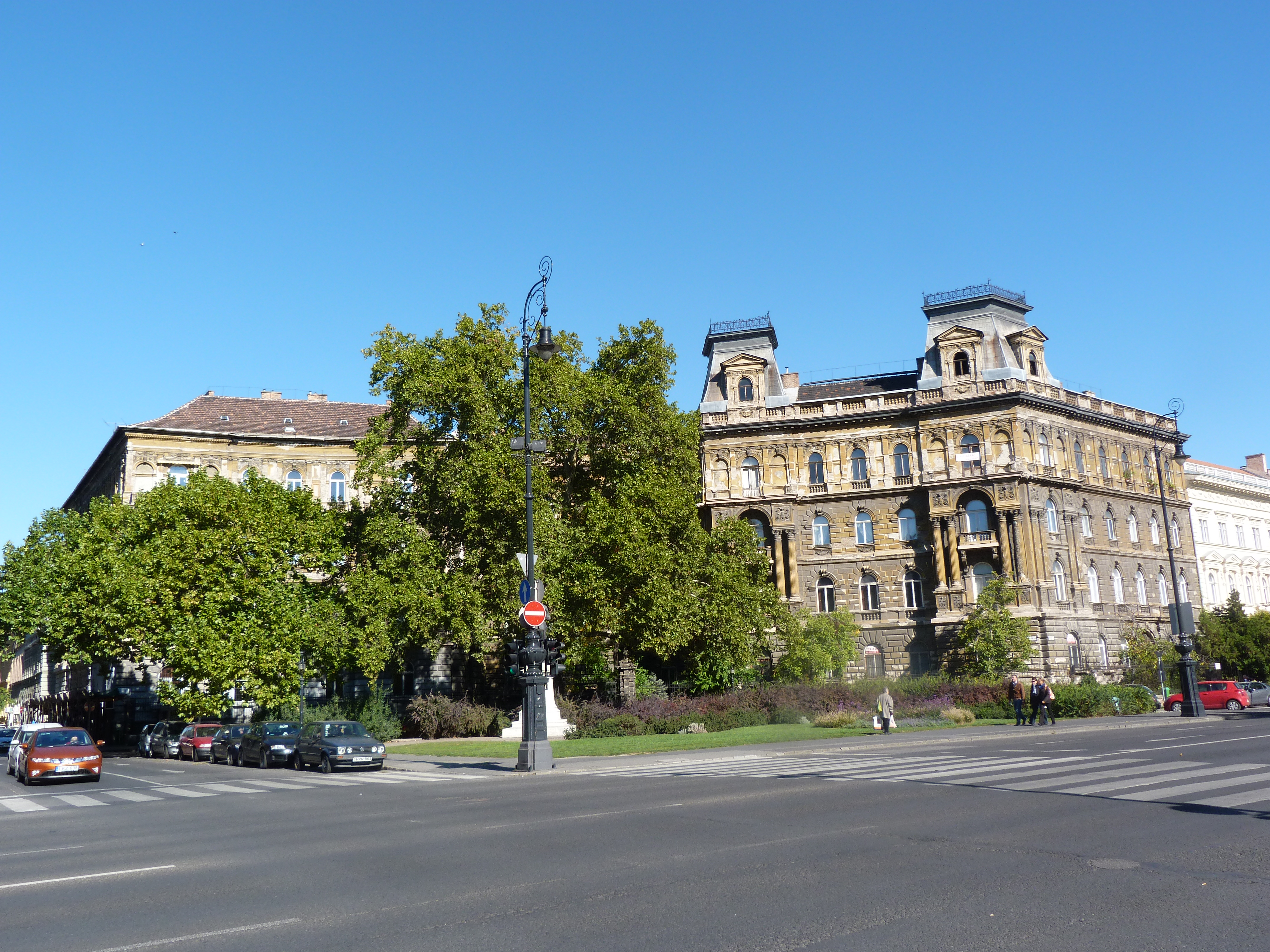 A felvétel 2013. Október 3 –án csütörtökön készült Budapesten. Andrássy út 92-94 szám (Körönd 4 szám). ©© Derzsi Elekes Andor, Budapest, 2013, You are authorised to use these photos and vids under Creative Commons – even for commercial, for profit purposes. Photos must be attributed to Derzsi Elekes Andor. All of the photos and vids in the Metapolisz DVD line are under Creative Commons and can be used even for commercial – for profit – purposes. Recommended Citation Derzsi Elekes Andor: Metapolisz DVD line